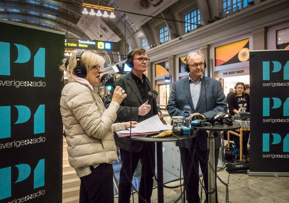 Studio Ett sänder direkt inför publik på Centralstationen i Stockholm den 8 februari 2017. Ämne: Vilka argument finns för och mot negativ ränta, vilka är vinnare och förlorare, och hur påverkar det samhället? Programledare: Sören Granath och Helena Groll. Gäst: f.d. statsminister Göran Persson.